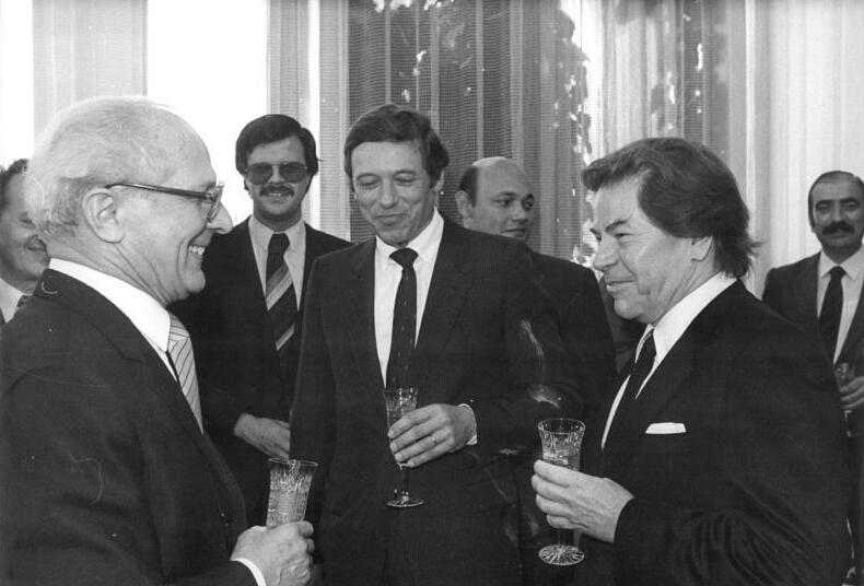 ADN-ZB Mittelstädt-29.5.81-eng Berlin: Der Generalsekretär des ZK der SED und Vorsitzende des Staatsrates der DDR, Erich Honecker, empfing die in der DDR akkreditierten Chefs der diplomatischen Missionen zur Entgegennahme ihrer Gratulation anläßlich seiner Wahl zum Vorsitzenden des Staatsrates der DDR, Hier im Gespräch mit dem Leiter der Ständigen Vertretung der BRD, Klaus Bölling (Mitte), und dem Botschafter Mexikos, Dr. Ricardo Guerra Tejada (r.)